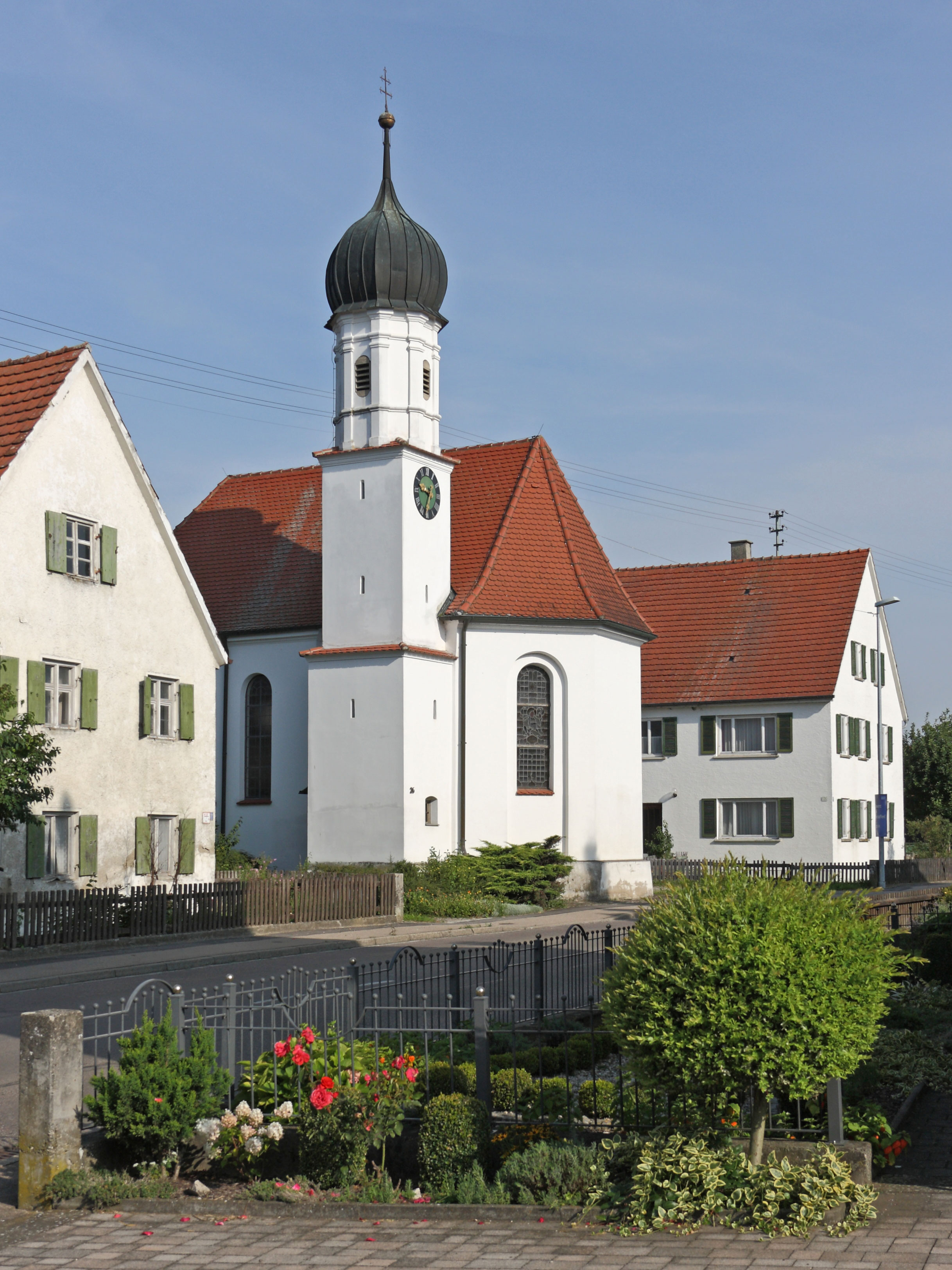 Kath. Filialkirche St. Ottilia in Ried, Gemeinde Kammeltal; Südostansicht